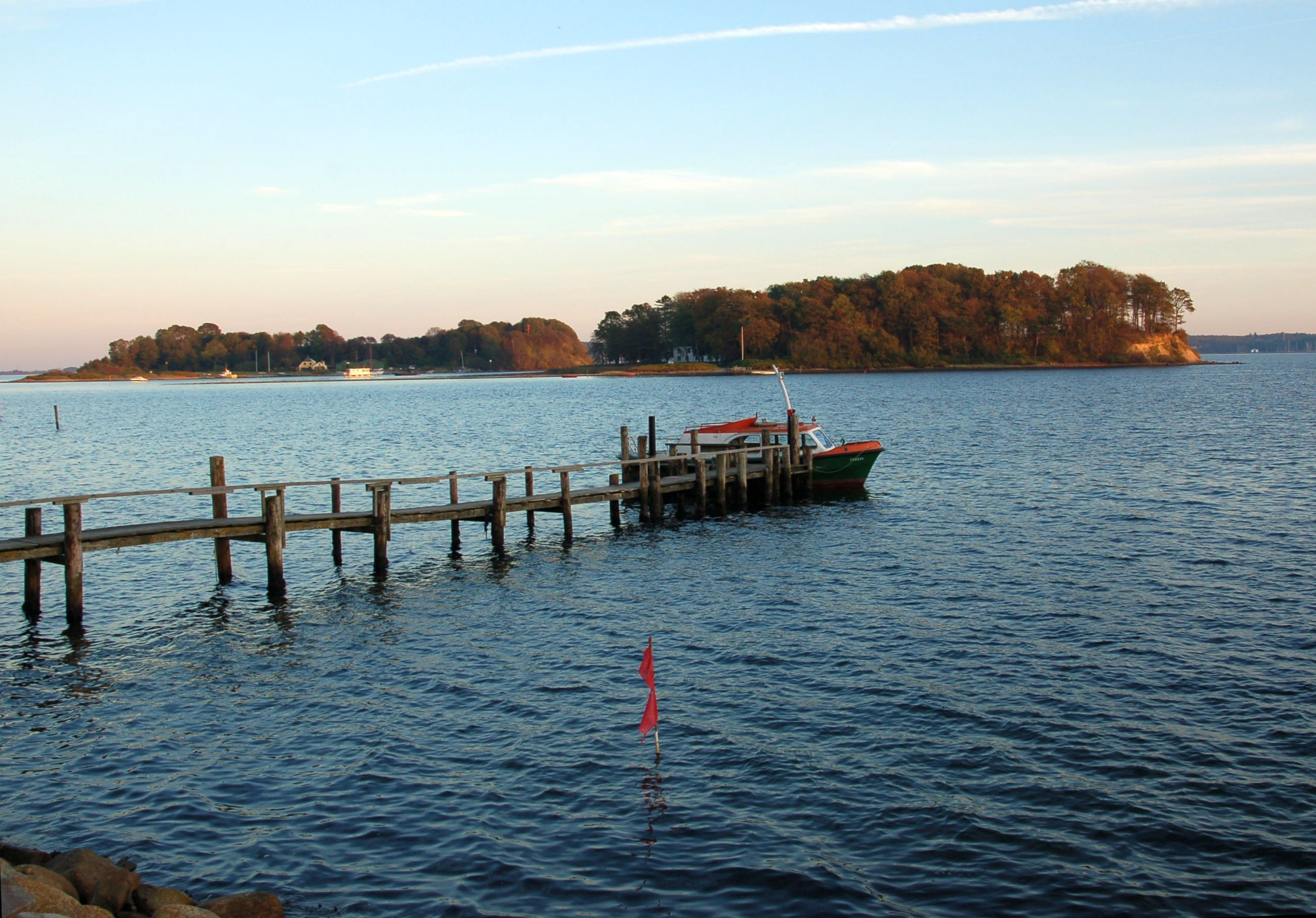 Okseøer at Sønderhav, Denmark